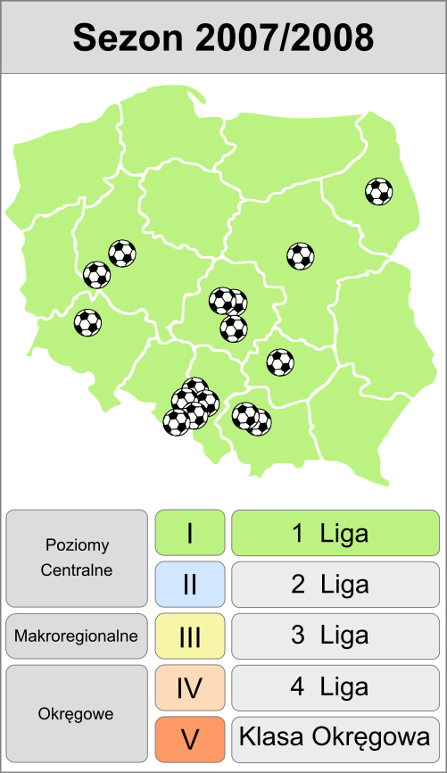 Jagiellonia Białystok w sezonie 2007/2008 -mapka